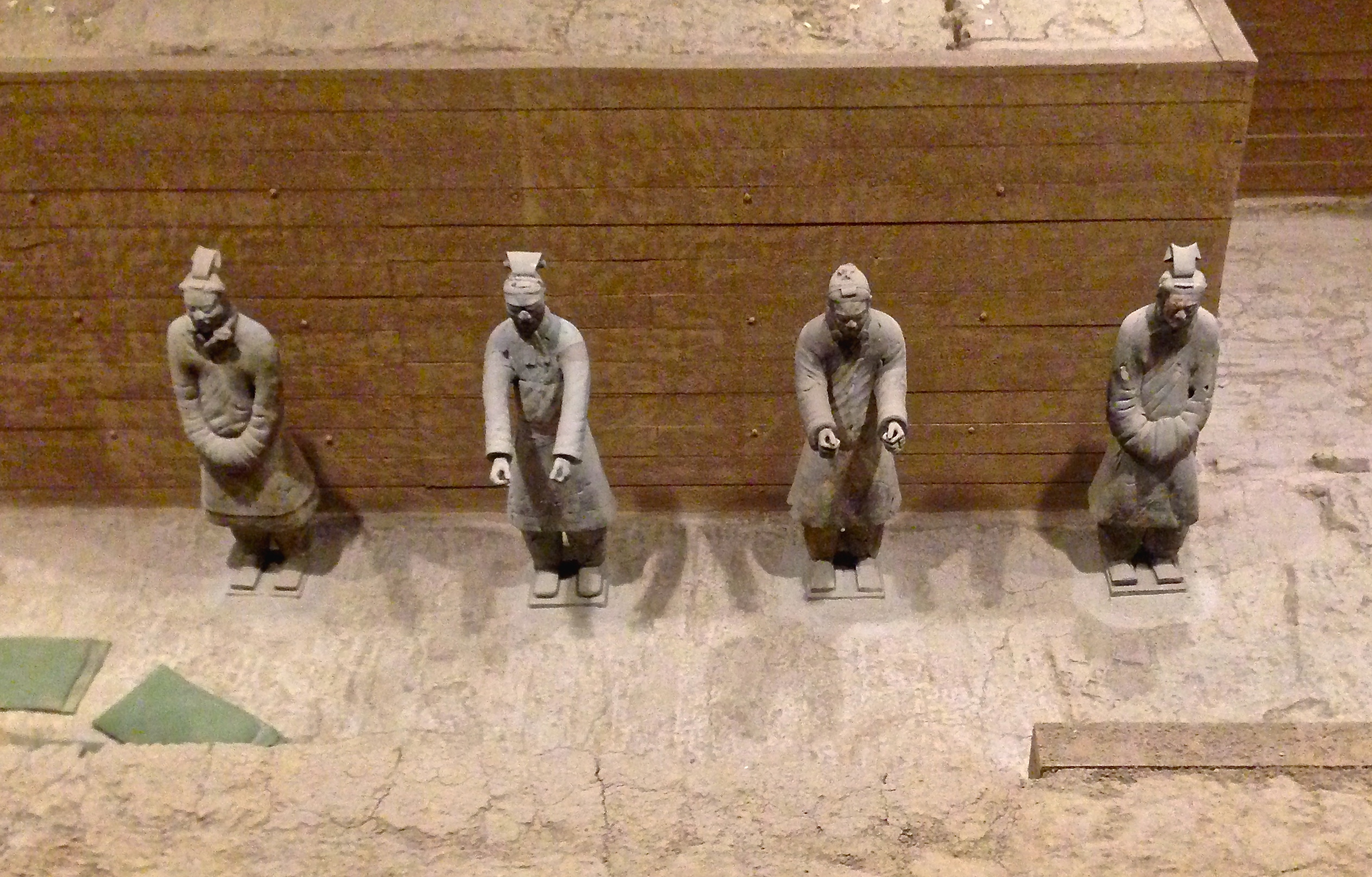 Utgrävda tjänstemän i Gropen K0006 vid Qin Shi Huangdis mausoleum